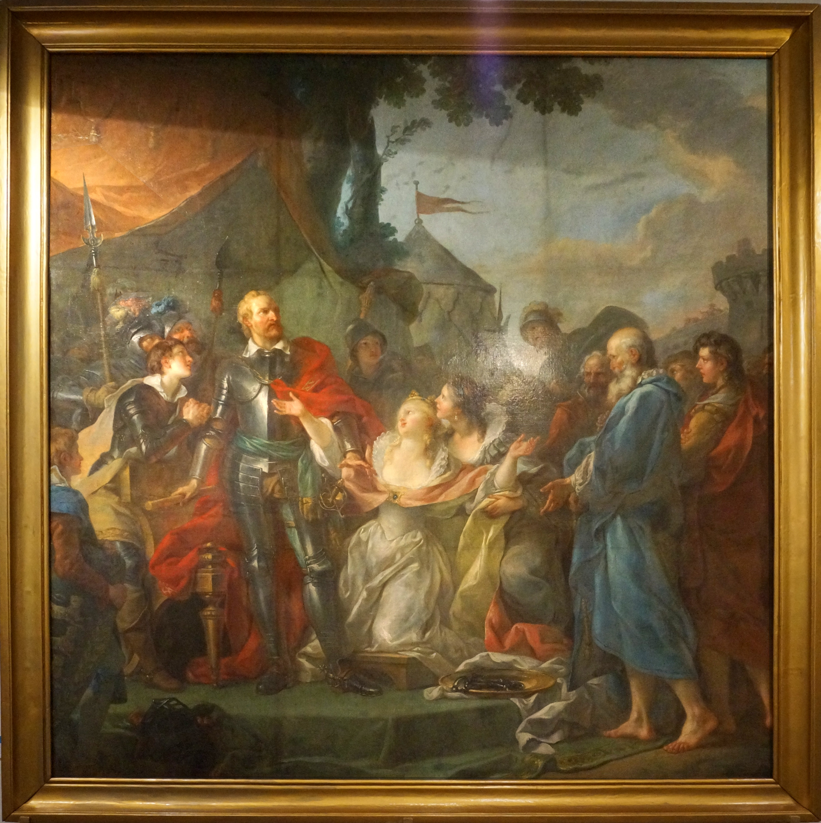 peintures présentées au musée de Laon.